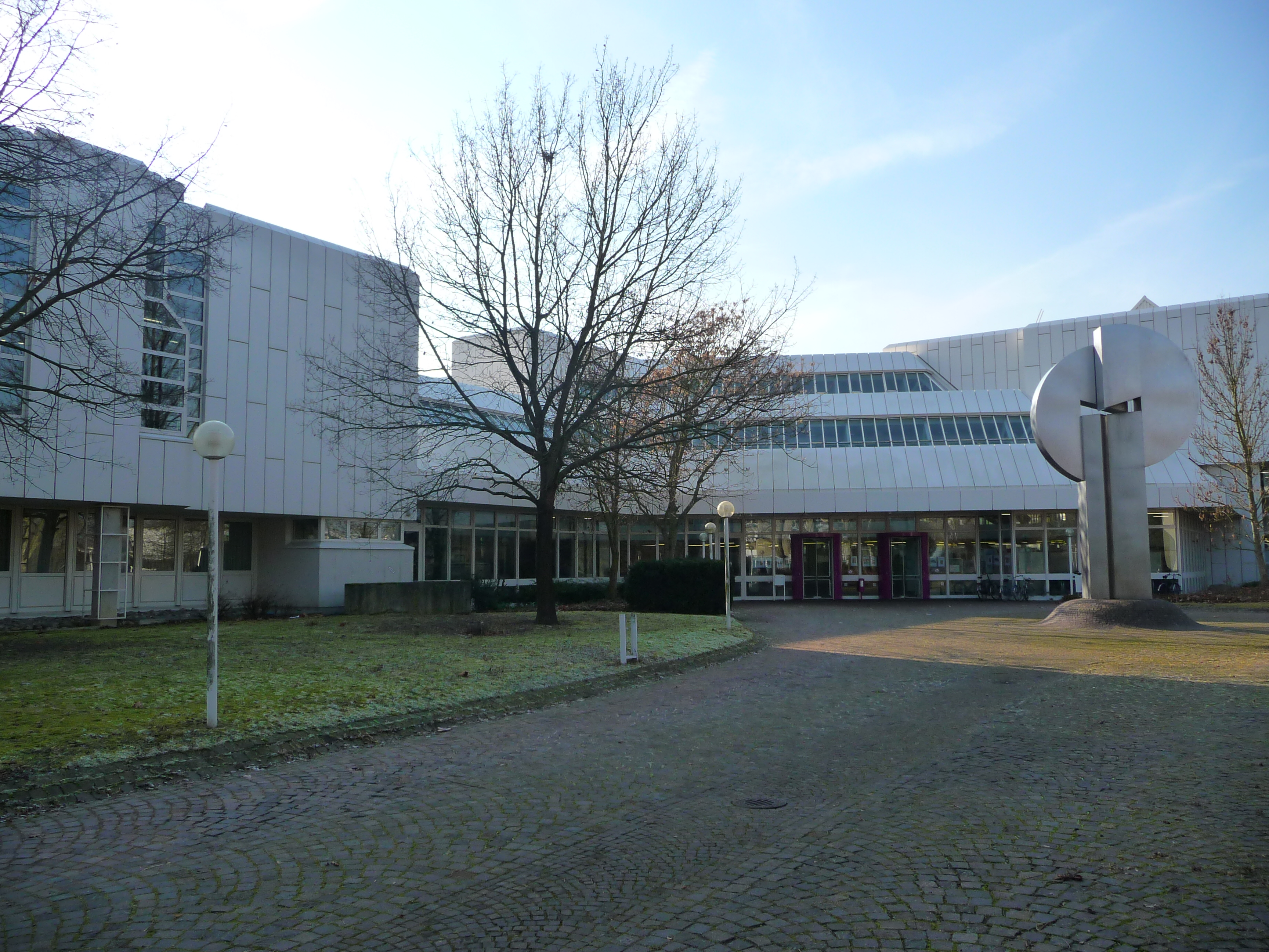 Pfälzische Landesbibliothek und Landesarchiv Speyer